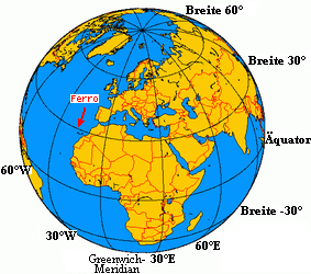 Lage des Ferro-Meridians